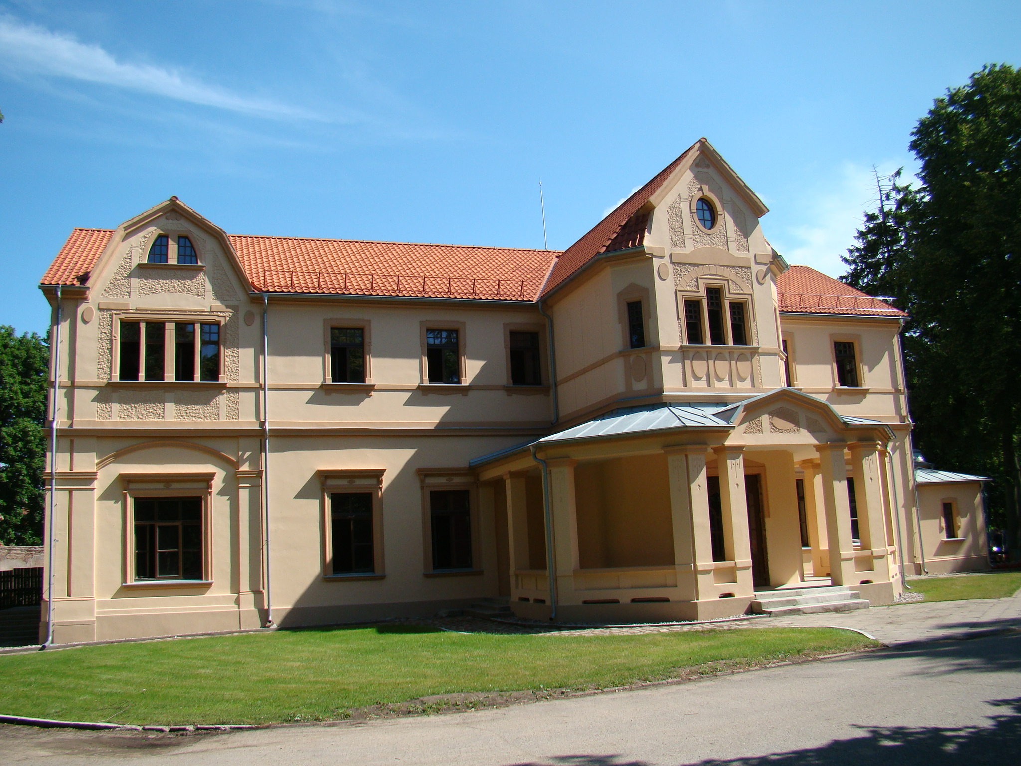 Palangos kurhauzas 2013 m. po atstatymo